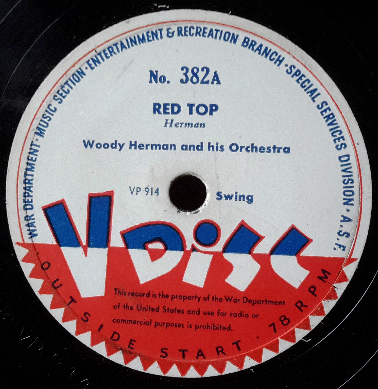 Label der Marke Vdisc, Aufnahme der Jazz Band von Woody Herman